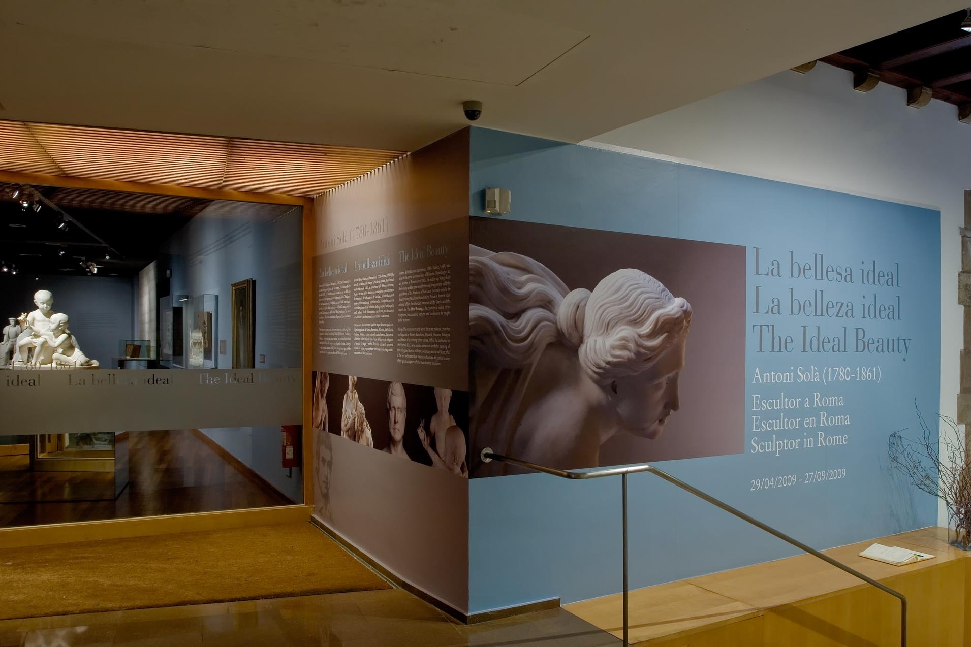 Antoni Solà Exposicions - Fot. Figuerda&Stallard